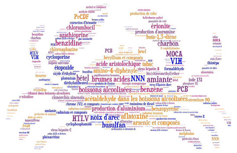 D'après la classification du Centre international de recherche sur le cancer (CIRC) : groupe 1.